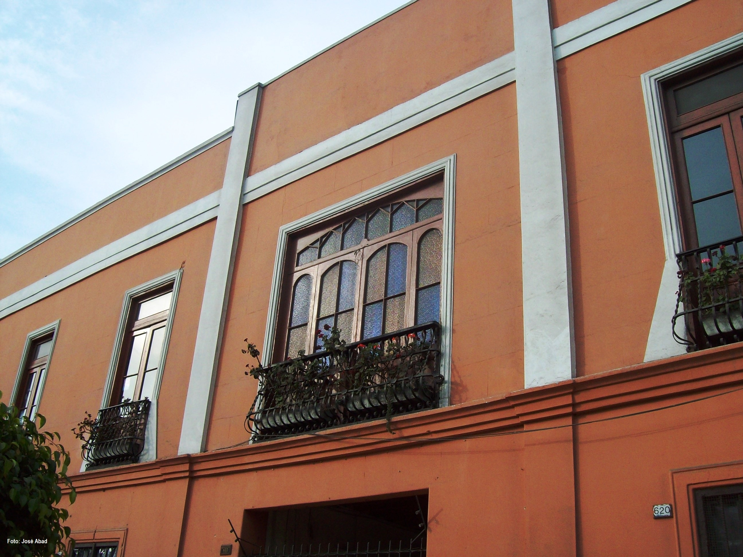 Detalle de las ventanas del conjunto arquitectónico multifamiliar de la sexta cuadra de la Avenida Arica, Demolido en el año 2014.